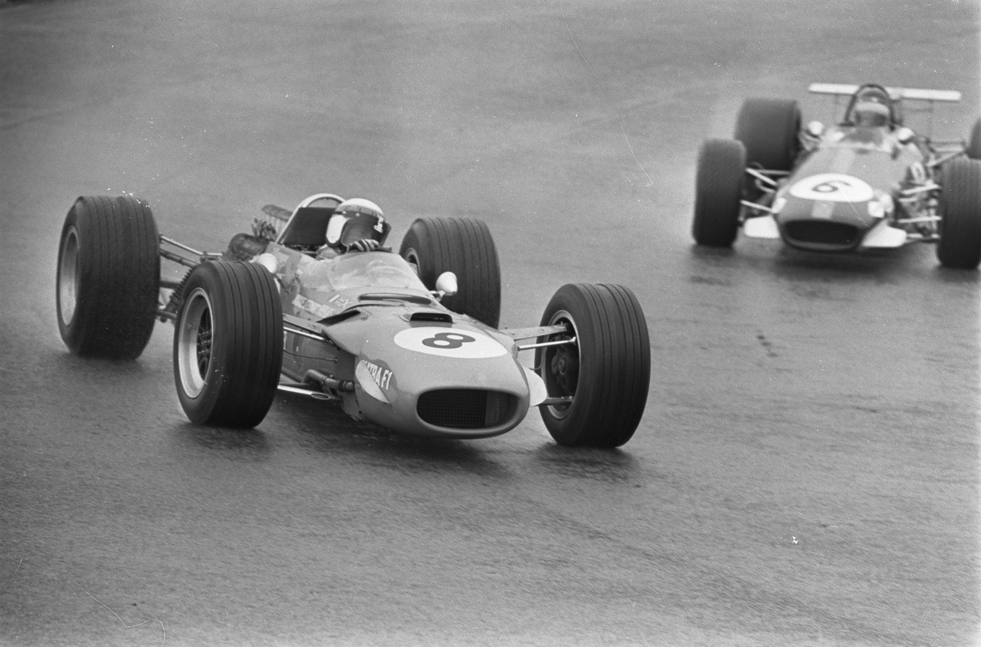 Grand Prix 68 Zandvoort . Nummer 34 Beltoise, nummer 35 Stewart, nummer 36 Jackie Olivier , nummer 36a Jackie Stewart /.